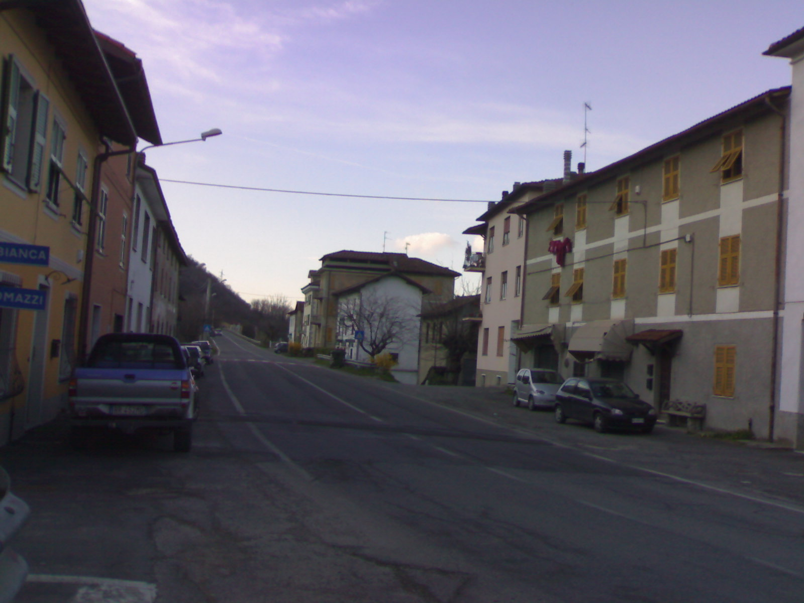 La frazione di Rigoroso, Arquata Scrivia (AL)